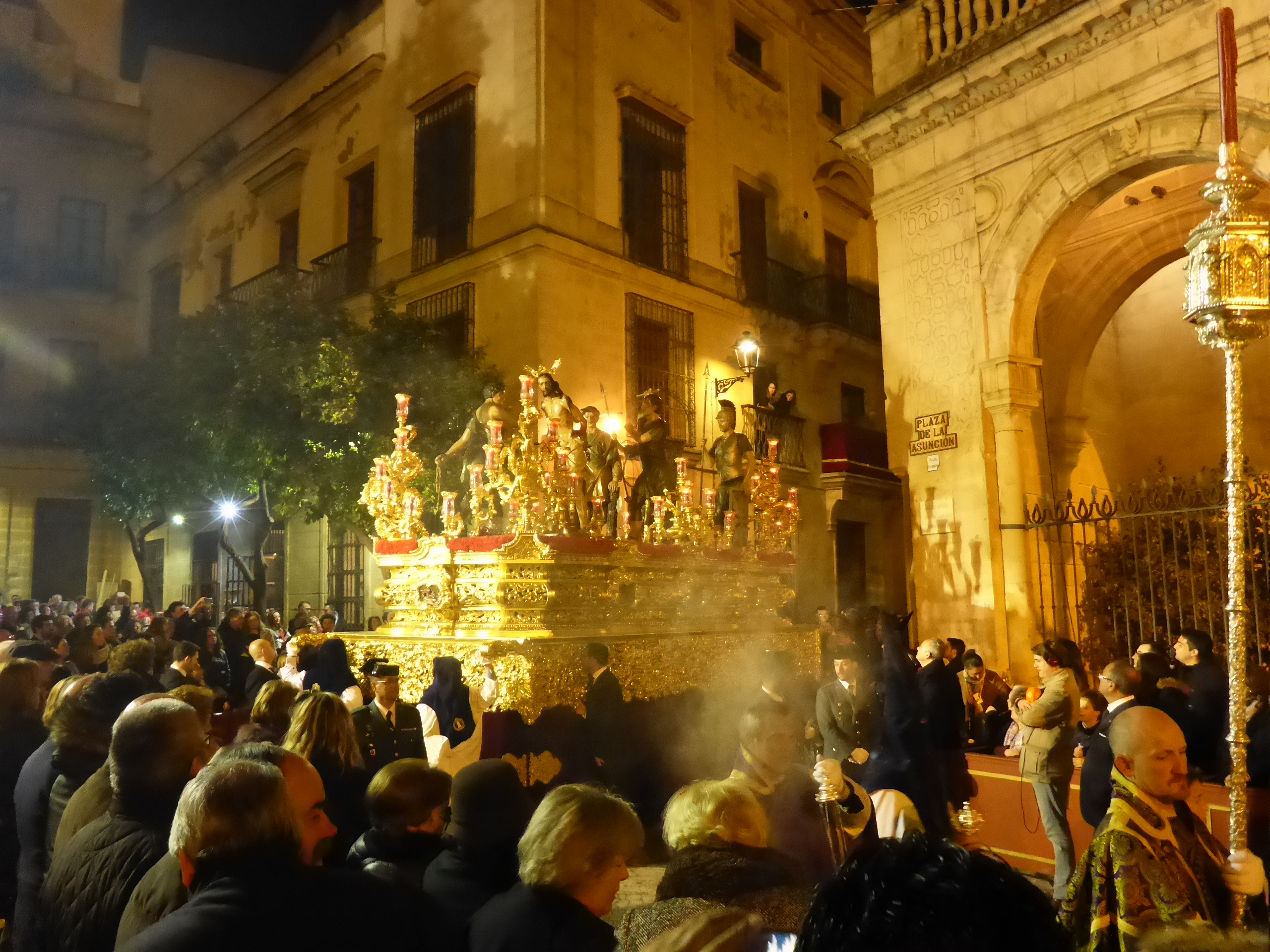 Hermandad de la Amargura (Jerez, España) This is a photography of a Folklore festival in Spain (Wikidata id Q6124533).